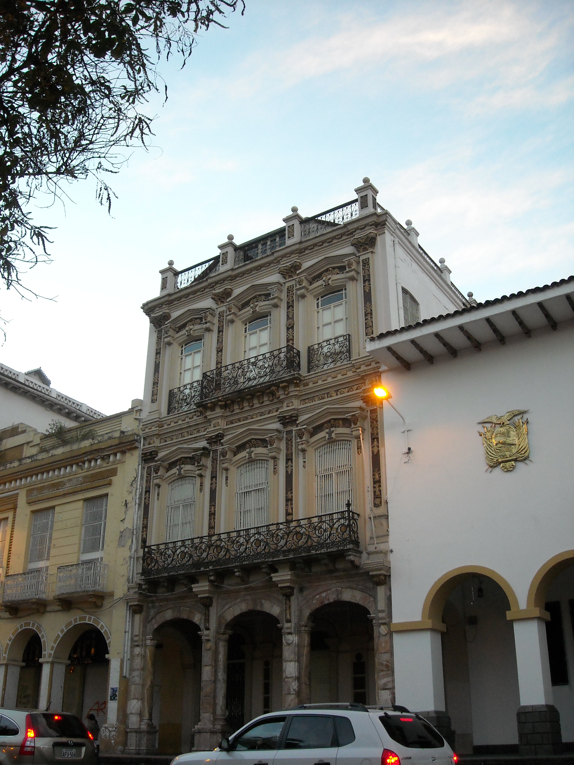 Cuenca posee una notable cantidad de edificios de estilo francés.